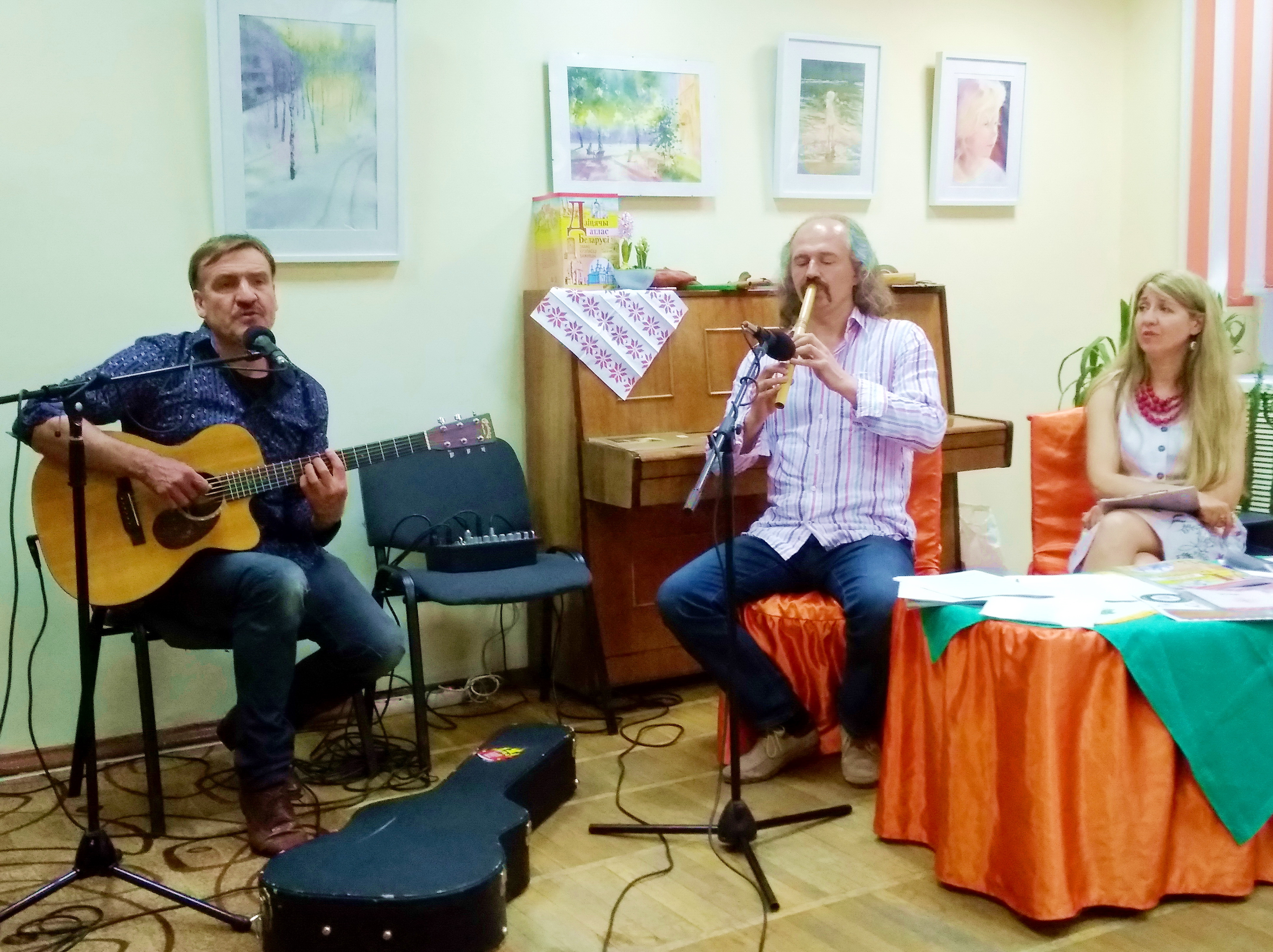 Прэзентацыя кнігі «Дзіцячы атлас Беларусі. Замкі, крэпасці, бажніцы». Бібліятэка ім. Цёткі, Мінск. Піт Паўлаў, Яраш Малішэўскі і Аксана Спрынчан